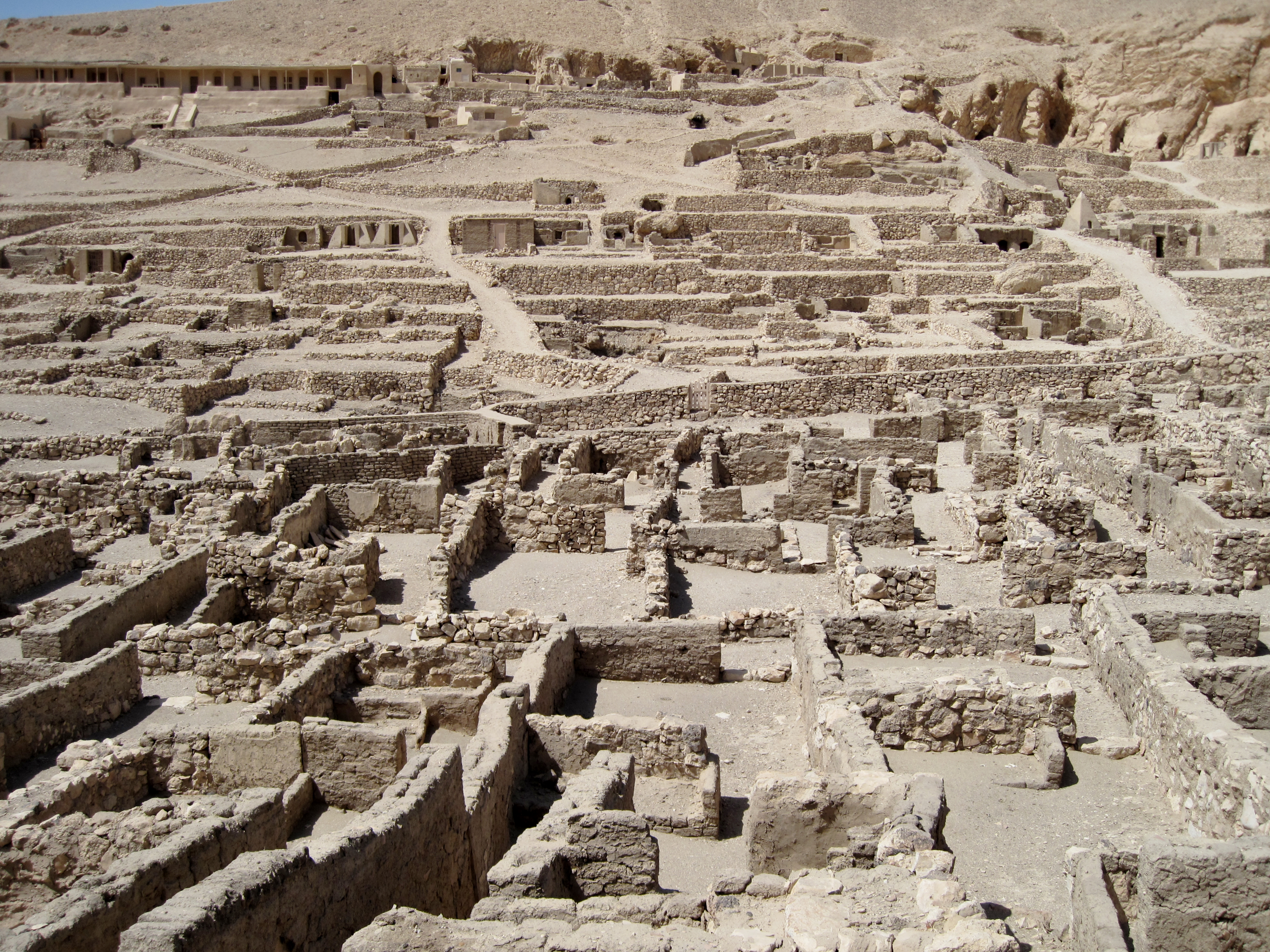 Arbeitersiedlung von Deir el-Medina („Kloster der Stadt“), altägyptisch Set Maat („Platz der Wahrheit“), in Theben-West bei Luxor, Ägypten